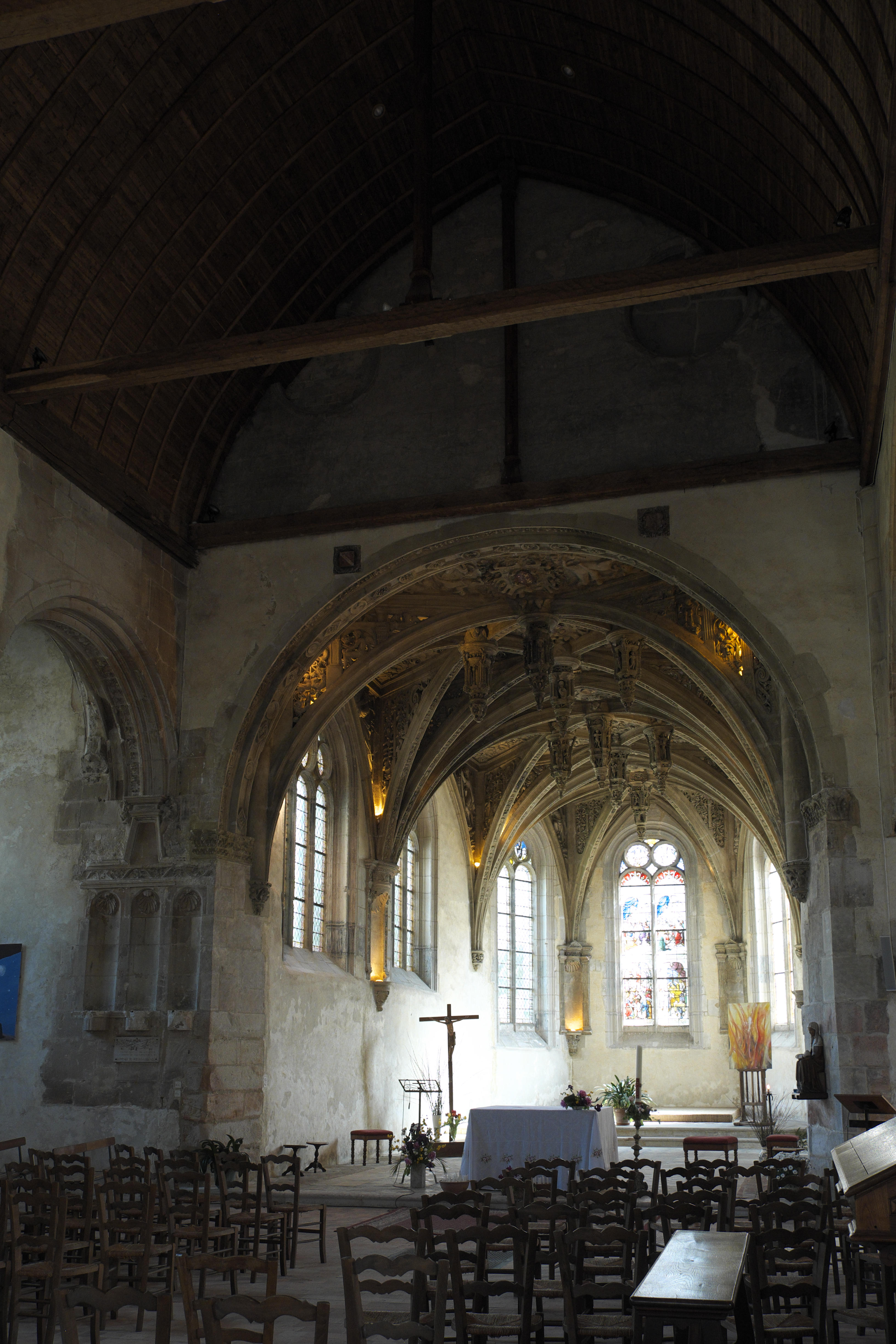 Katholische Kirche Saint-Hilaire in Tillières-sur-Avre im Département Eure (Region Normandie/Frankreich), Chor